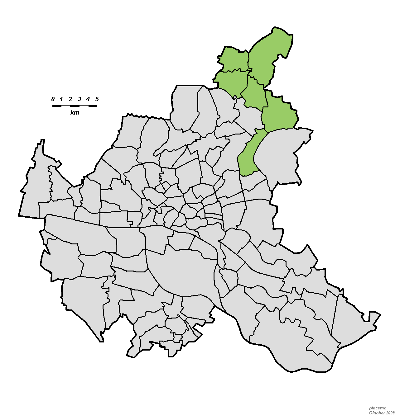 Lage des ehemaligen Ortsamtsgebietes Walddörfer in Hamburg.